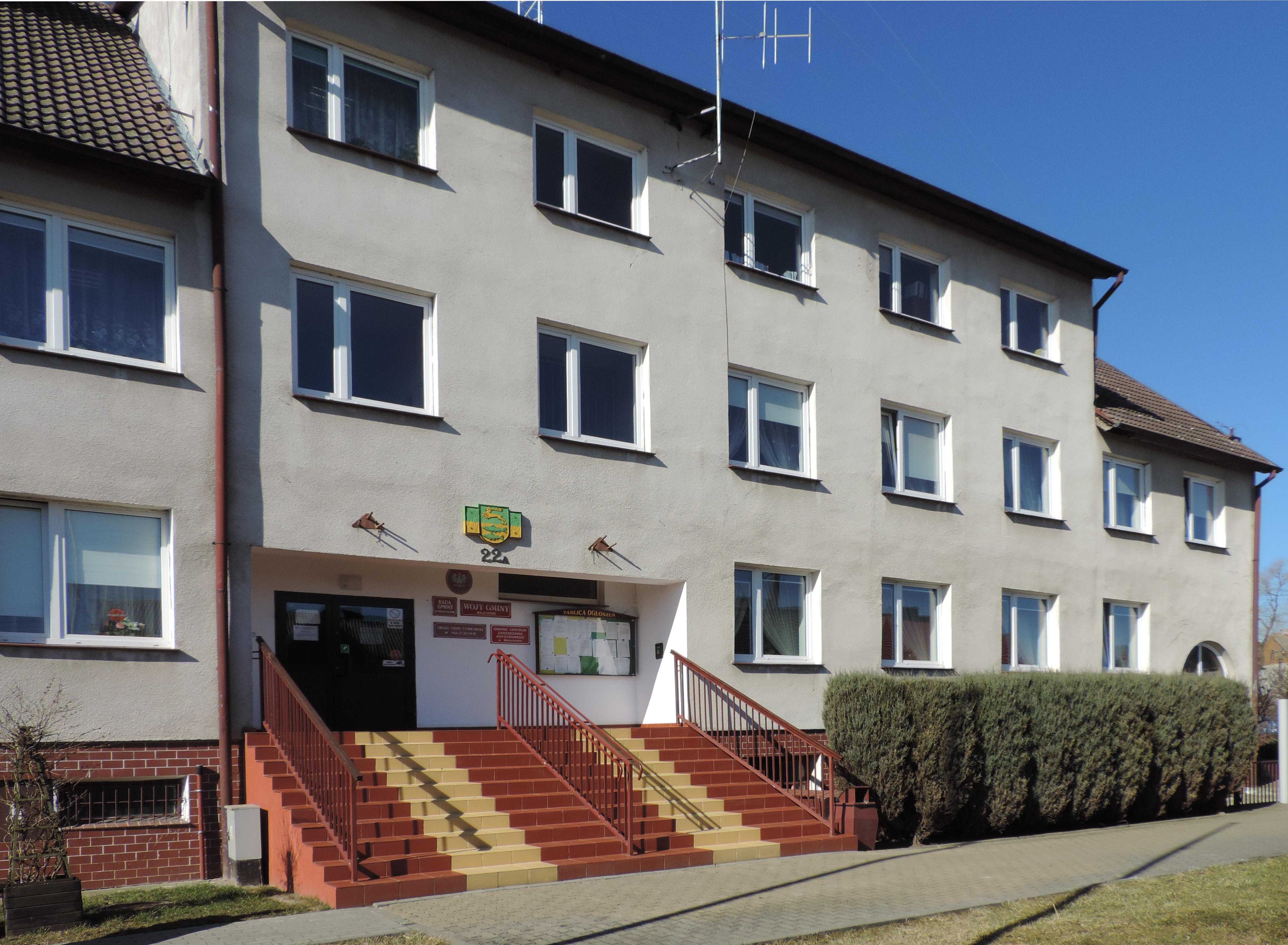 Urząd Gminy Malechowo